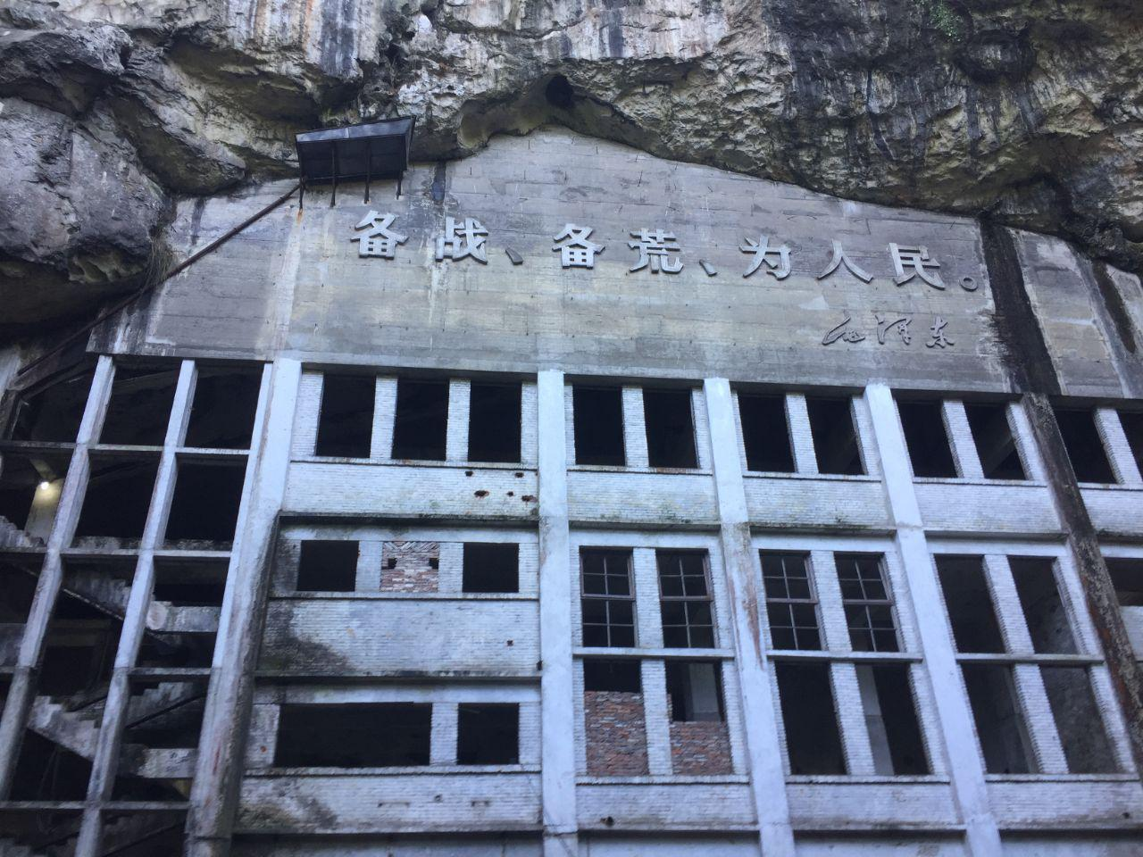 红日机械厂（军工代号“五四四厂”）隶属于中华人民共和国第五机械工业部，位于湖南省邵阳市新邵县寸石镇。该兵工厂始建于1966年，后于20世纪80年代职工全部撤离，原址转为民用。